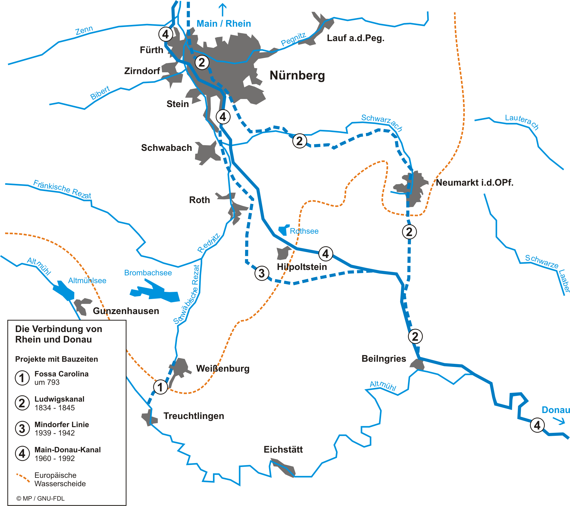 Übersichtskarte über die verschiedenen Projekte zur Verbindung von Main und Donau